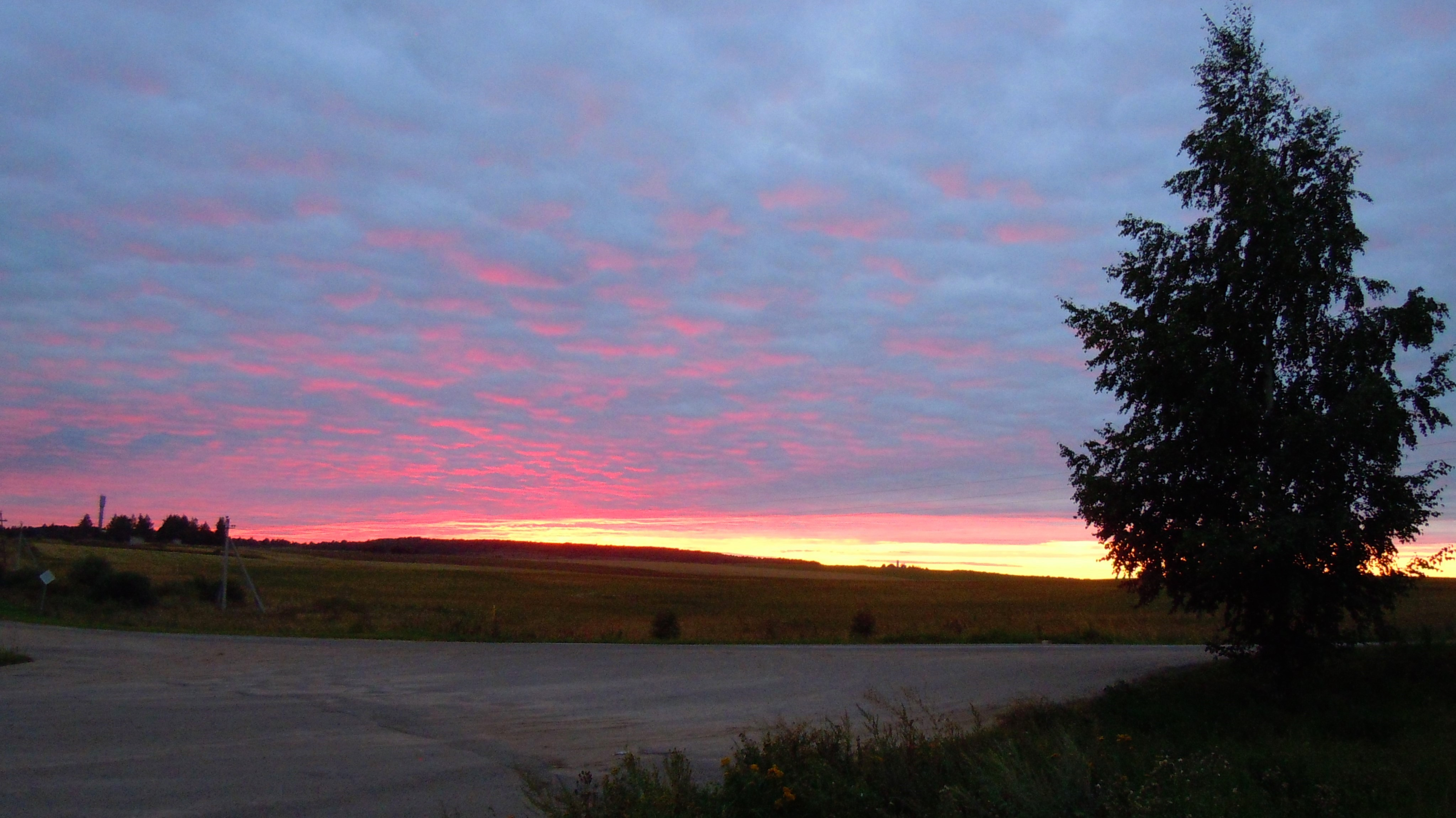 Потрясающий закат в селе Шурскол (24 августа 2013 г.)